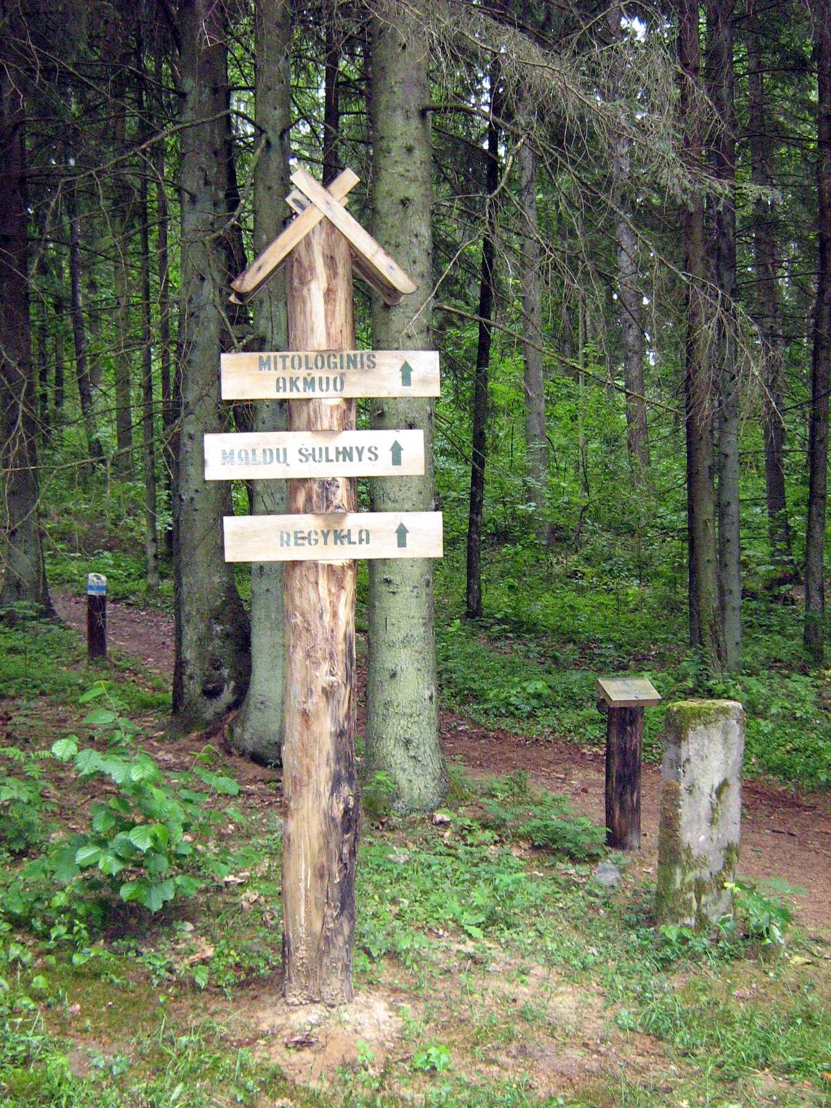 Mikytų kraštovaizdžio draustinis, Plungės rajonas, Žemaitijos nacionalinio parko teritorija Foto: Algirdas, 2007 m. birželio 15 d., Lietuva